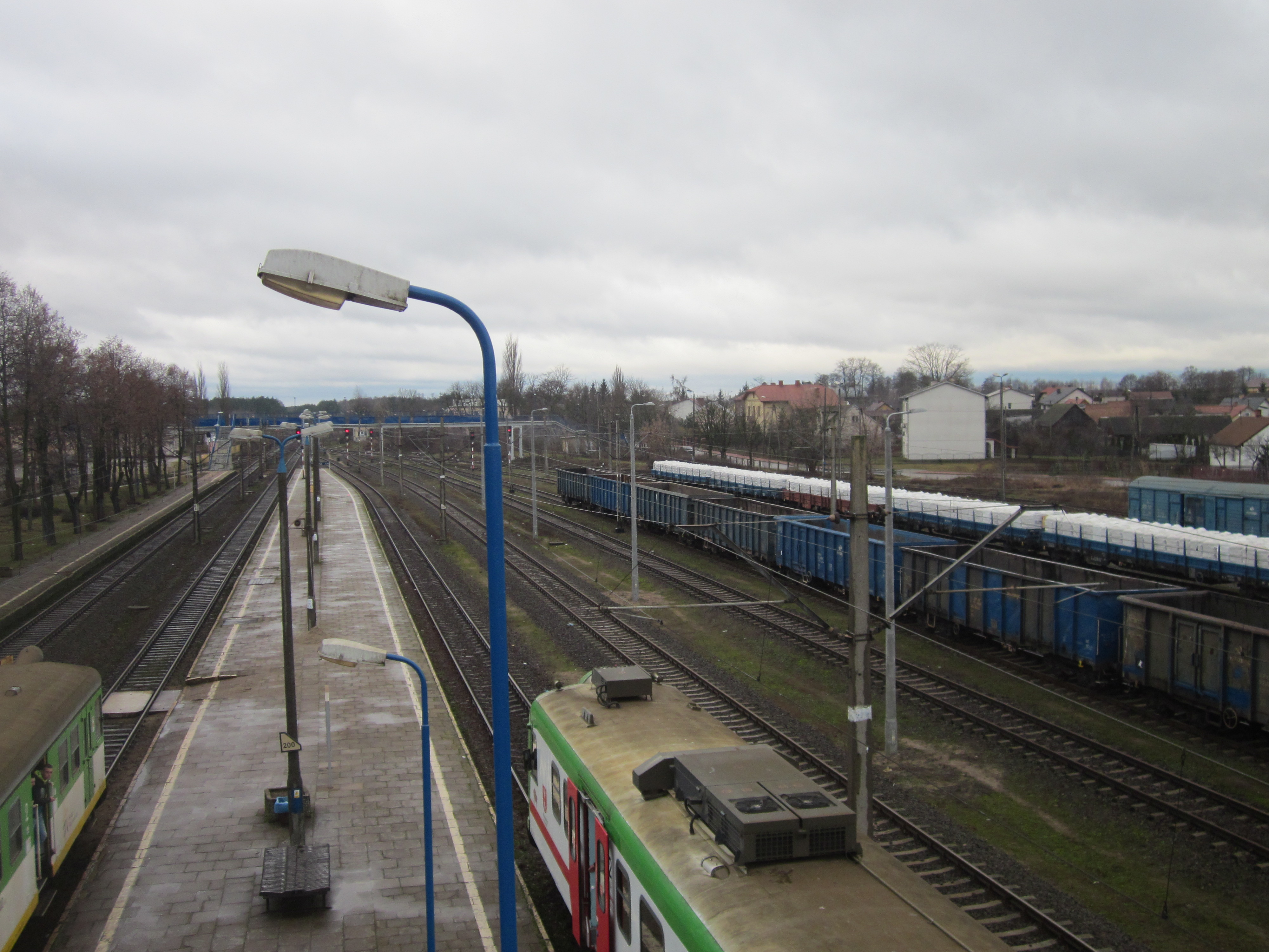 Zdjęcie zostało zrobione 12 stycznia 2014 roku podczas 22 finału WOŚP – przejazd specjalnym pociągiem WOŚP na trasie Szepietowo – Czyżew – Małkinia – Czyżew – Szepietowo.